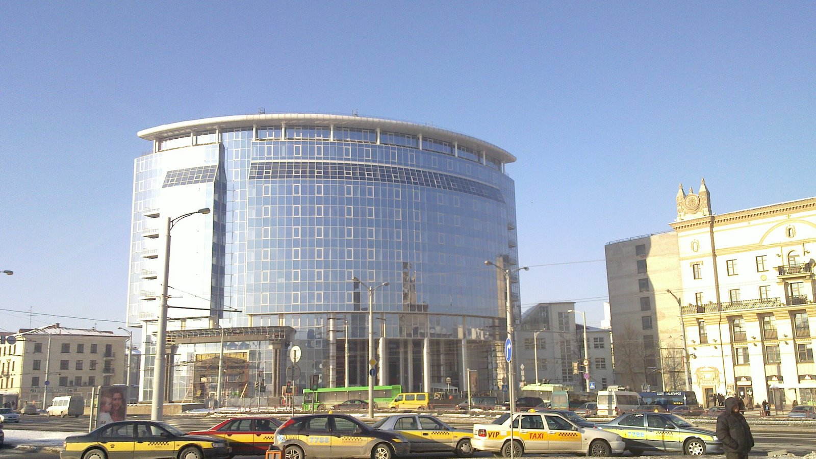 ул.Бобруйская